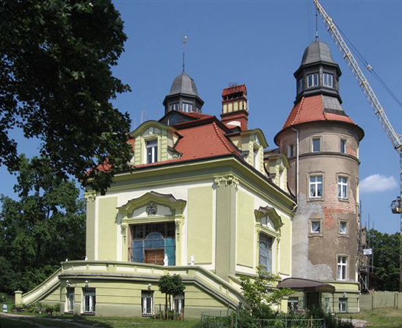 Pałac w Jędrzychowicach